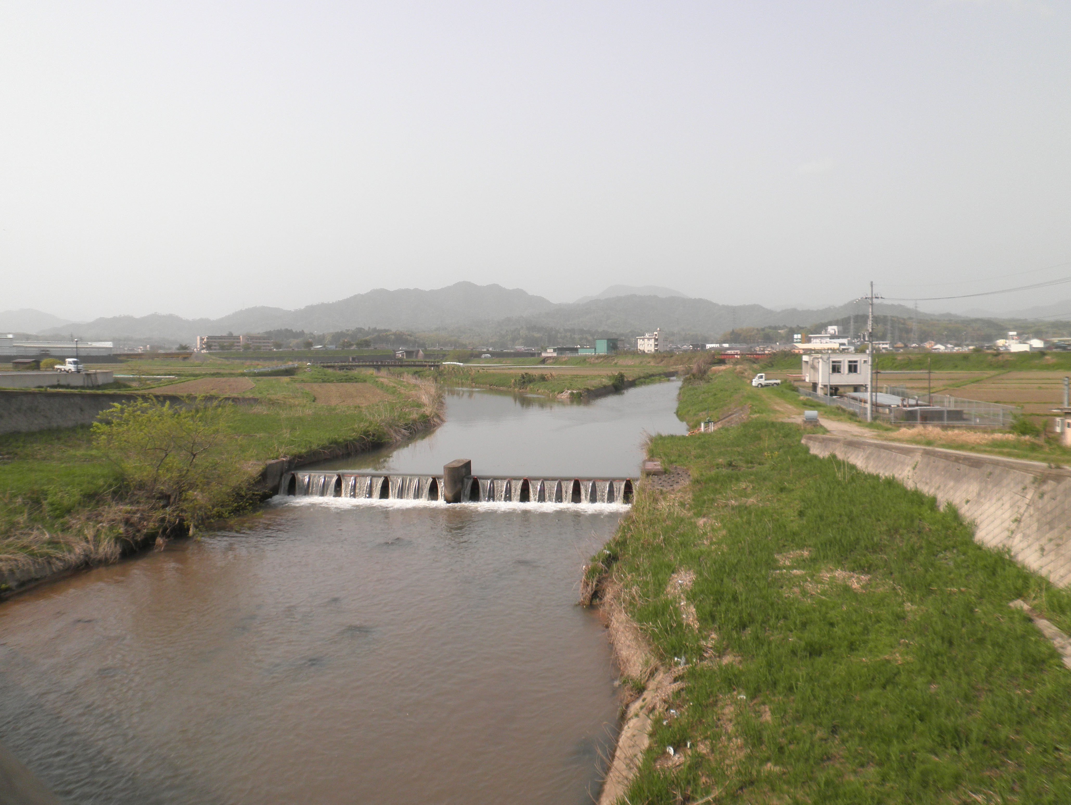 京都府京丹後市を流れる竹野川。峰山市街地南東部にある、支流鱒留川との分岐点。